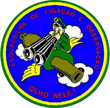 A insígnia da 1ª ELO apresenta um oficial (o piloto), empunhando um binóculo (representando a atividade do observador, em sua constante vigília), montado em um canhão (a "Poderosa Artilharia"). Este é elevado aos céus por um par de asas, representando a Força Aérea Brasileira - voando entre nuvens brancas, lembrando a Paz tão almejada, o todo sobre um campo em azul, representando os céus da Itália.